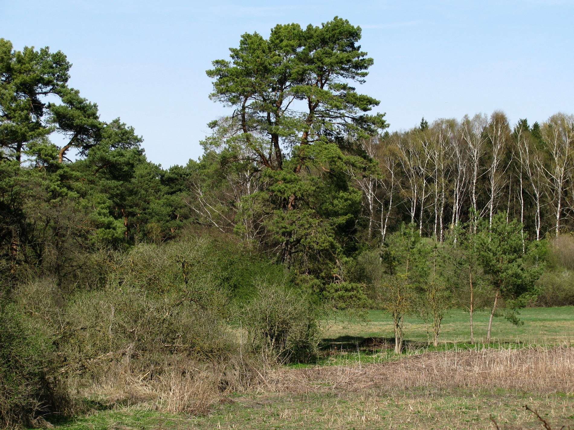 Schwarzhölzl in München-Feldmoching an der Stadtgrenze zu Karlsfeld.